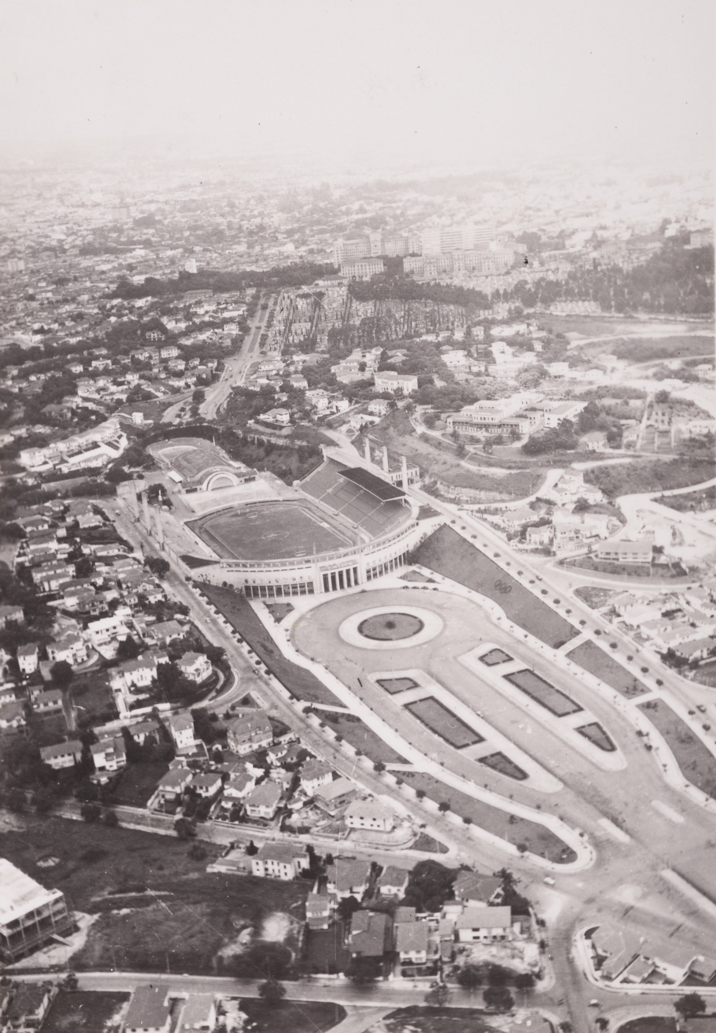 Obra que integra o acervo do Museu Paulista da USP. Coleção Werner Haberkorn - CHW